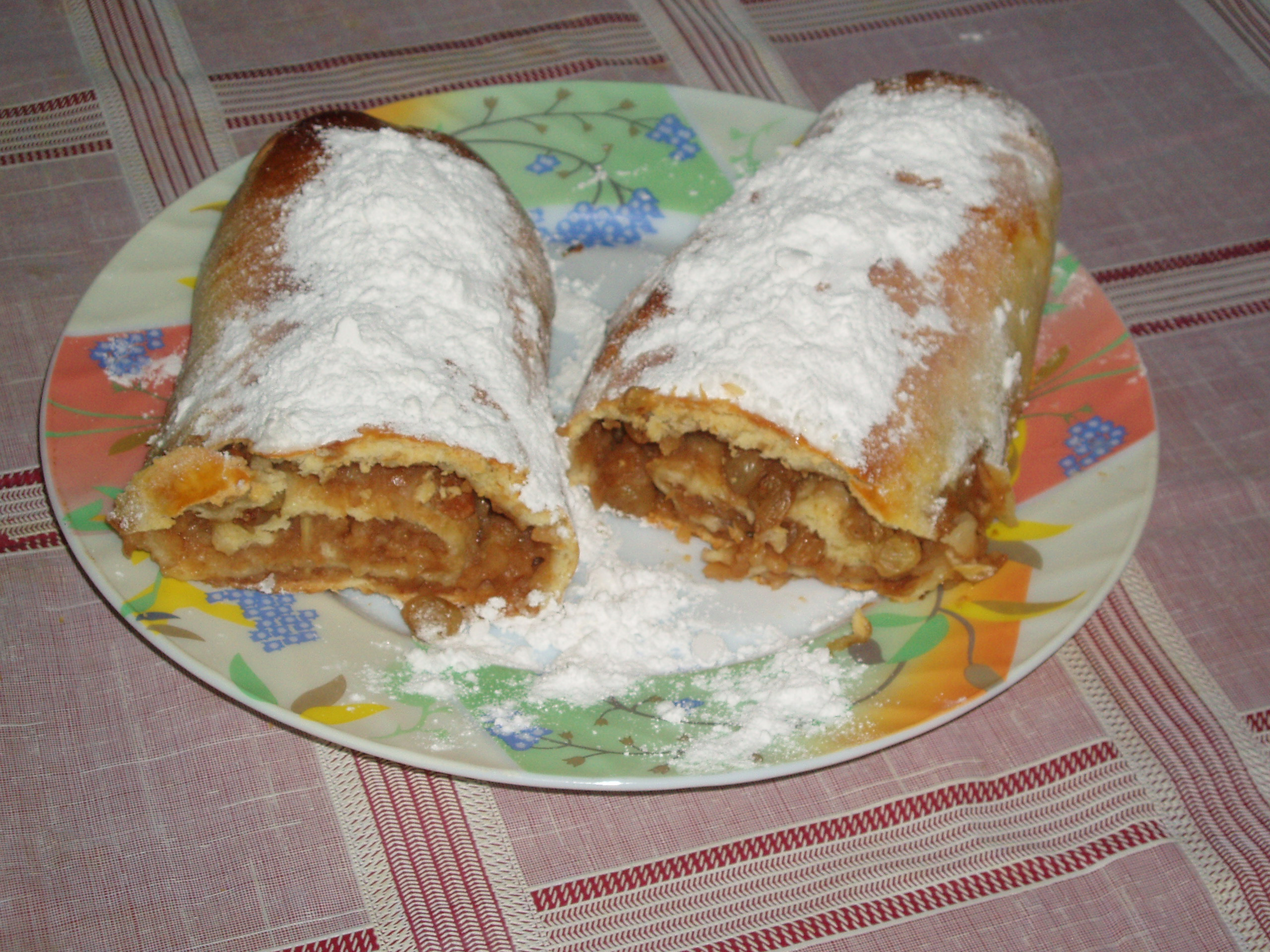 Штрудель